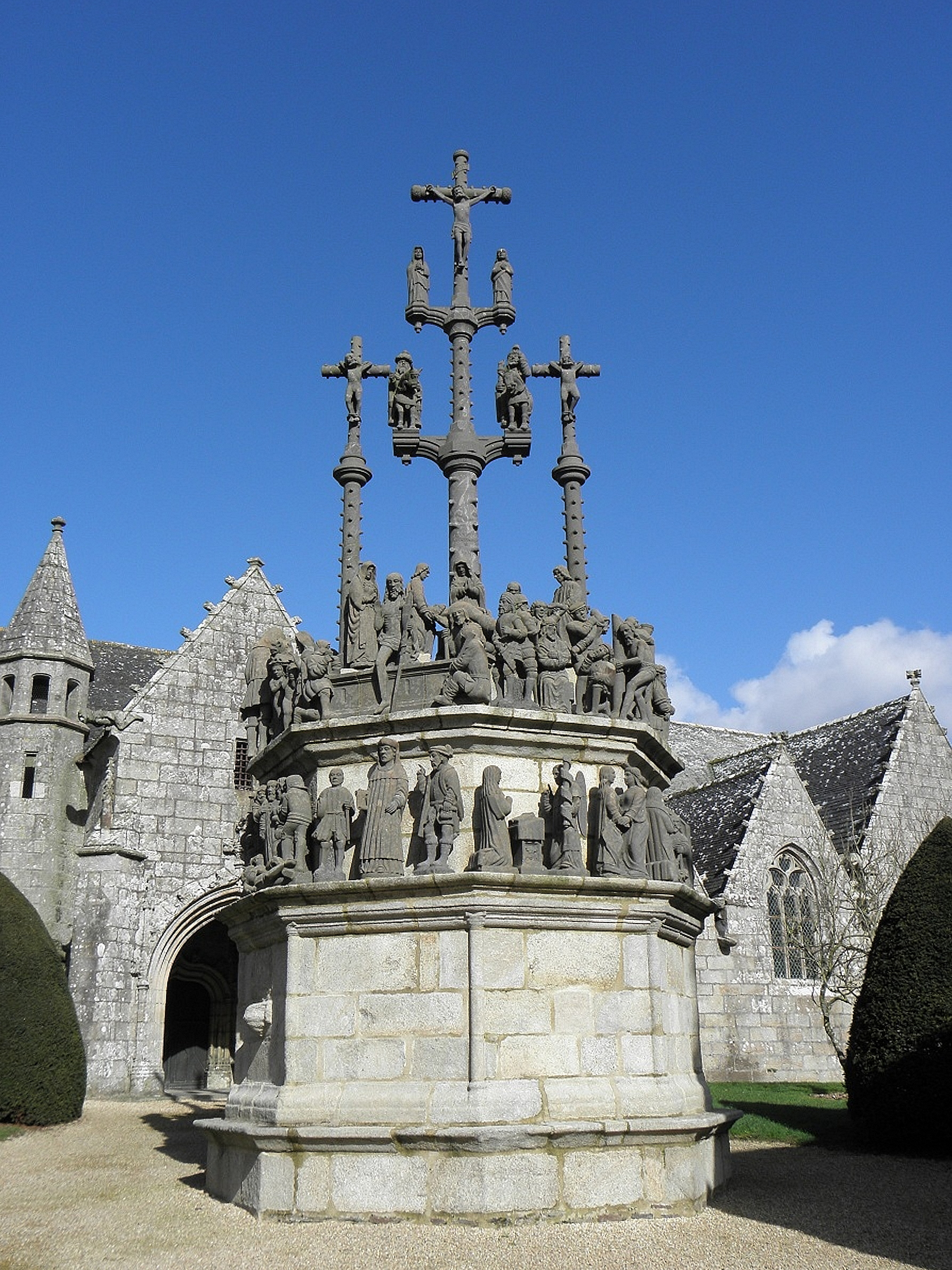 Calvaire de Plougonven (29). Construit en 1554, les croix du Christ ont été détruites à la Révolution , reconstruites en 1894.Les 7 calvaires monumentaux de Bretagne .